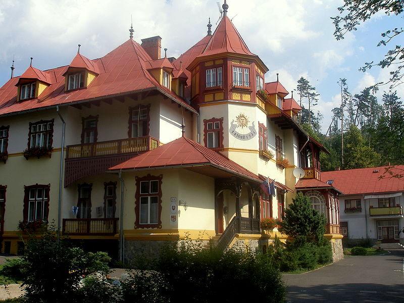 Zotavovňa Janka Jesenského, pôvodne to bola vila baróna Liptaya. Doba vzniku 1894. Prevládajúci sloh historizmus-alpský štýl. Architekt Alexander Fellner. Tatranská Lomnica. This medium shows the protected monument with the number 706-3859/0 in the Slovak Republic.